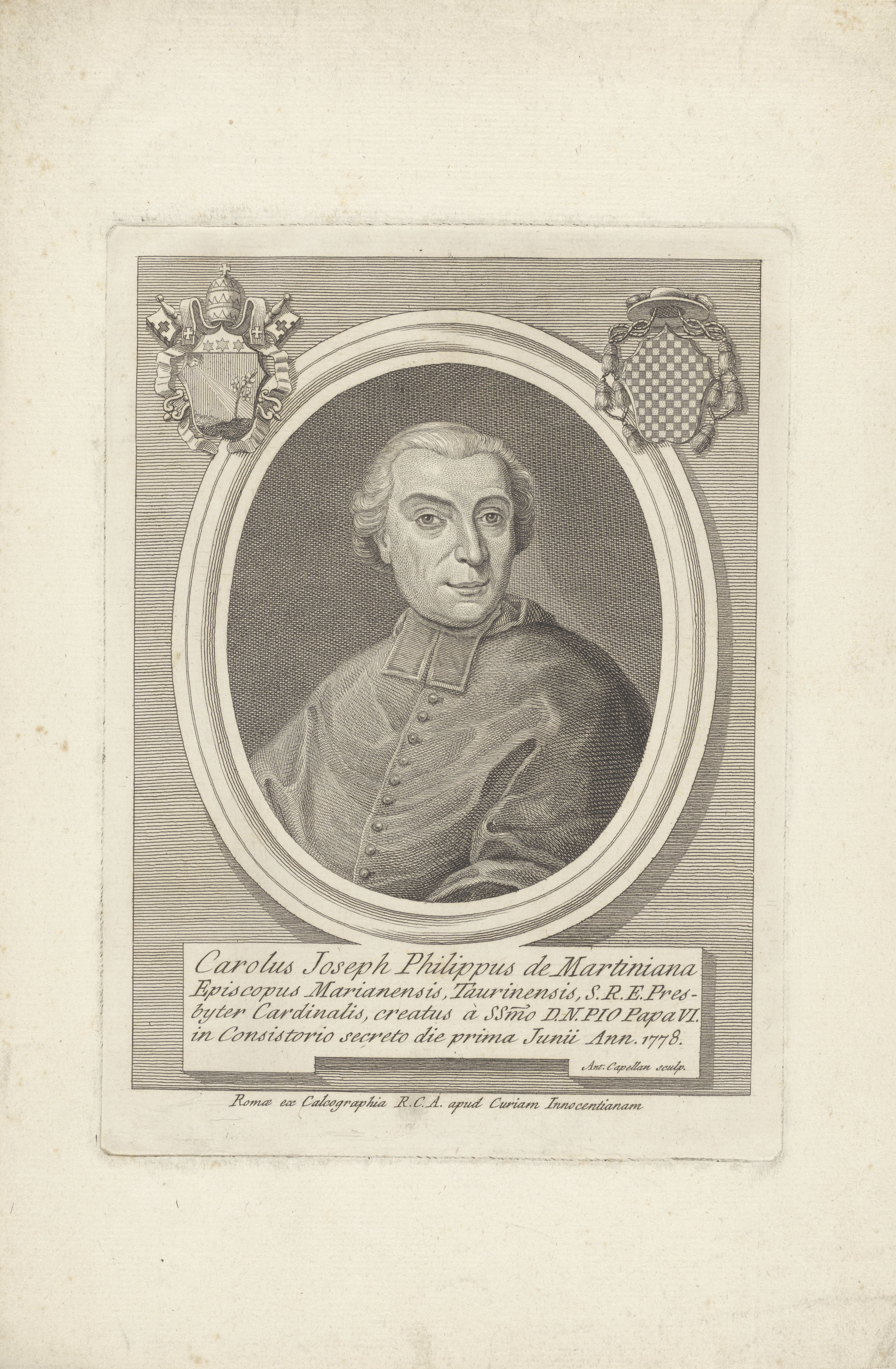 IdentificatieTitel(s): Portret van kardinaal Carlo Giuseppe Filippa della MartinianaPortretten van kardinalen (serietitel)Objecttype: prent Objectnummer: RP-P-1909-4822Opschriften / Merken: verzamelaarsmerk, verso, gestempeld: Lugt 2228VervaardigingVervaardiger: prentmaker: Antonio Capellan (vermeld op object)uitgever: Calcographia R.C.A. (vermeld op object)Plaats vervaardiging: prentmaker: Italiëuitgever: RomeDatering: 1778 - 1788Fysieke kenmerken: etsMateriaal: papier Techniek: etsenAfmetingen: plaatrand: h 227 mm × b 166 mmOnderwerpWat: historical personscardinalWie: Carlo Giuseppe Filippa della MartinianaVerwerving en rechtenVerwerving: aankoop 1905Copyright: Publiek domein